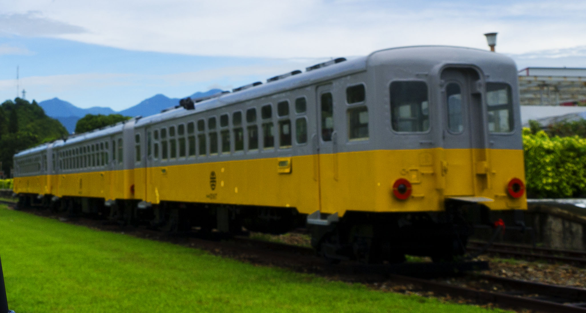 現存放於台東鐵道文化藝術村的DR2050車組(三輛)，由近到遠編號為DR2067、DR2069、DR2060，為原始東線光華號塗裝